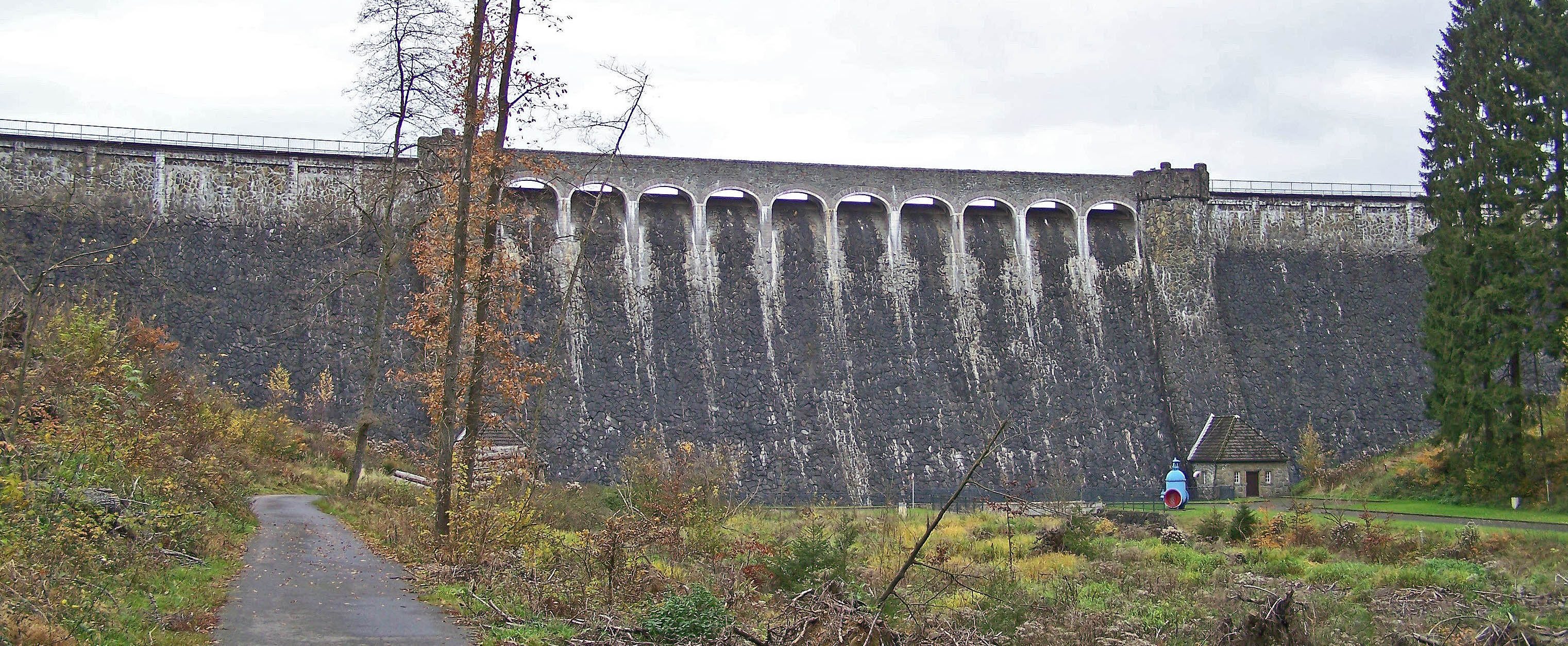 Sperrmauer der Kerspetalsperre bei Kierspe